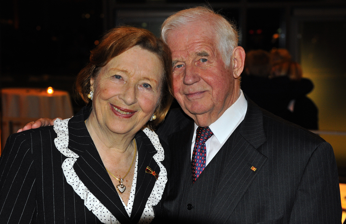 80. Geburtstag von Kurt Biedenkopf 2010 (in Dresden), zusammen mit seiner Frau Ingrid Biedenkopf